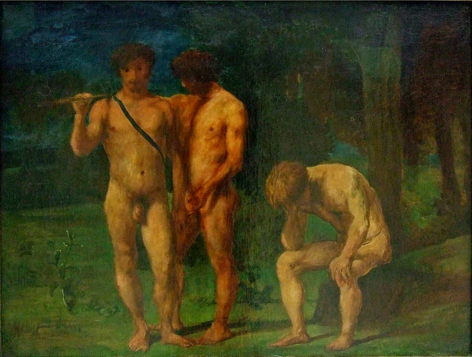 Drei Männer in der Landschaft (um 1874) von Hans von Marées. Düsseldorf, museum kunst palast, Gemäldegalerie. Charakteristisch für die Zeit in Florenz und die damals gehegten Träume. Marées variierte, häufig poetisch überhoht, das Beieinander von meist männlichen Aktfiguren in der Landschaft.